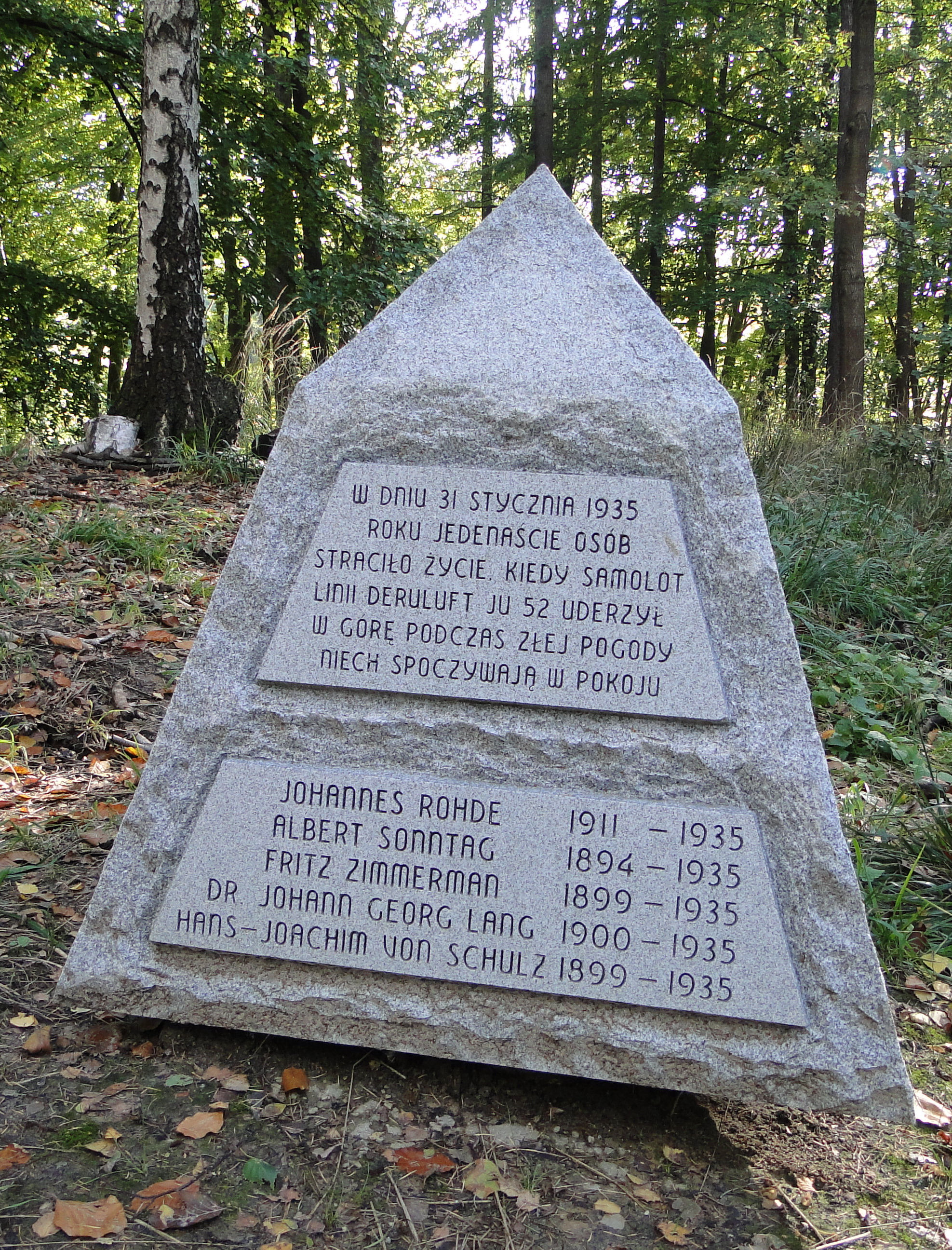 Pomnik ofiar katastrofy lotniczej 31.01.1935 pod Bukowcem koło Szczecina.